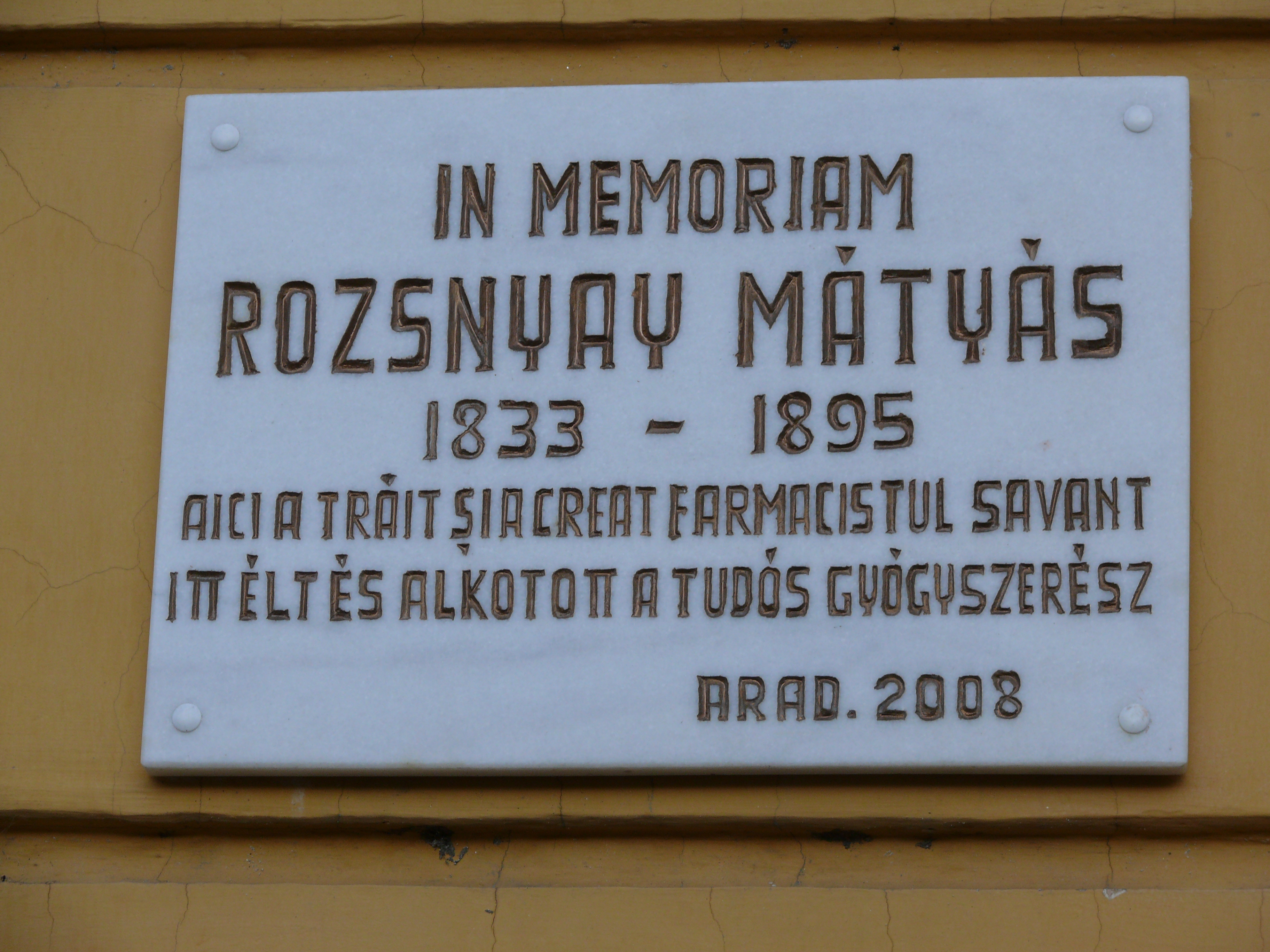 Rozsnyay Mátyás tudós gyógyszerész emléktáblája Aradon (Románia)